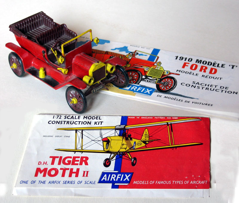 Small Airfix models 1957 Personal picture